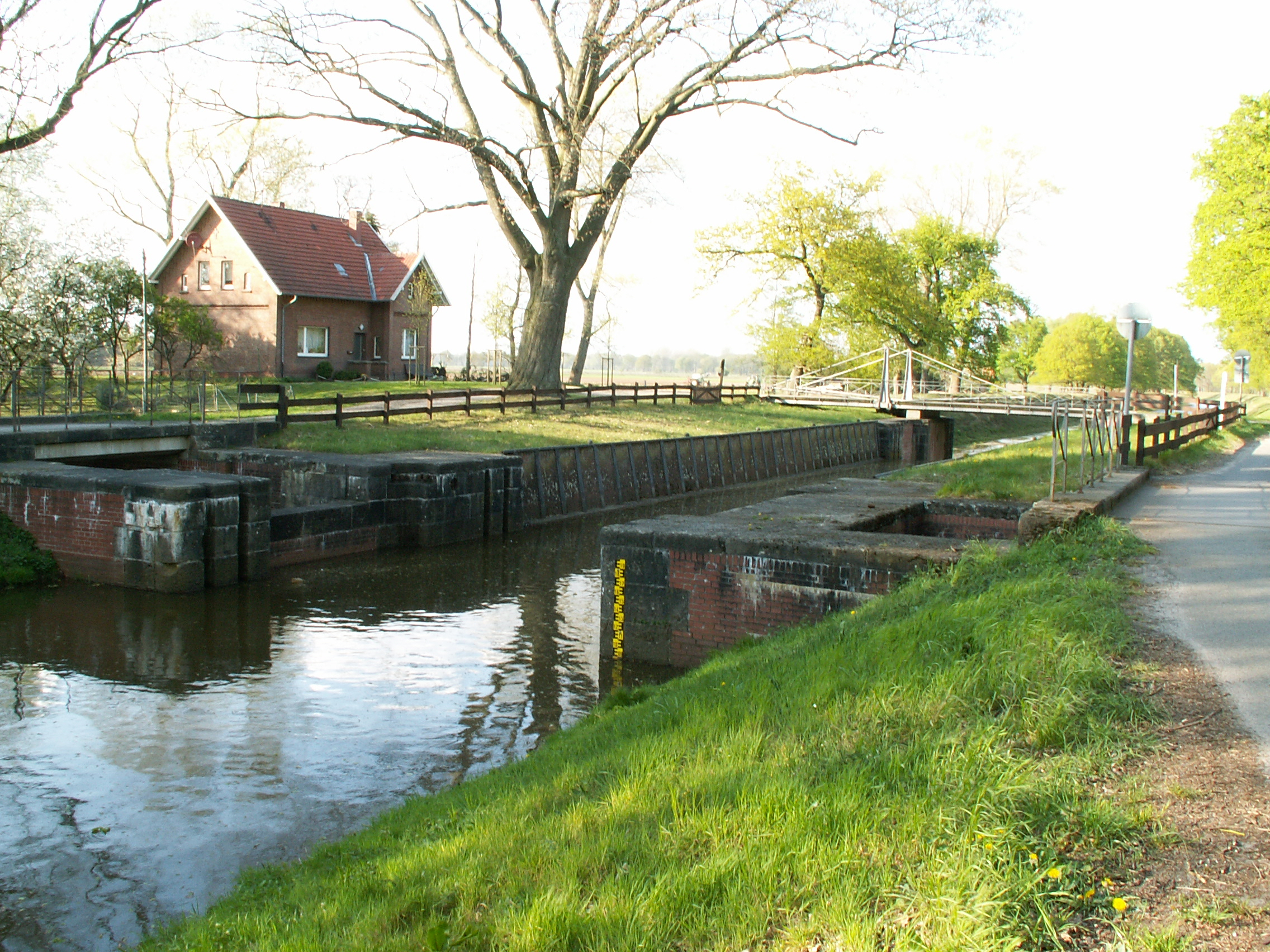 Schleuse 2 Süd-Nord-Kanal Nordhorn Linksemsisches Kanalnetz